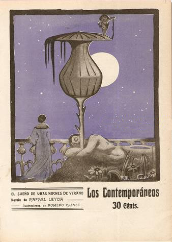 Portada de El sueño de unas noches de verano.